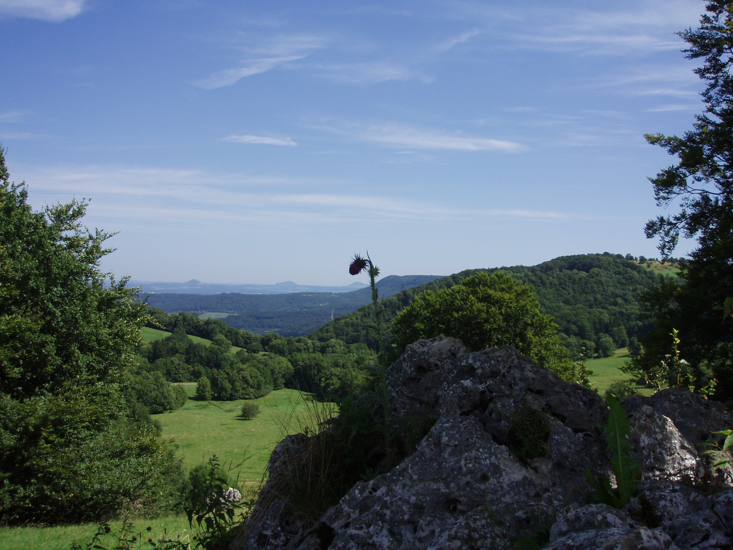 Randecker Maar